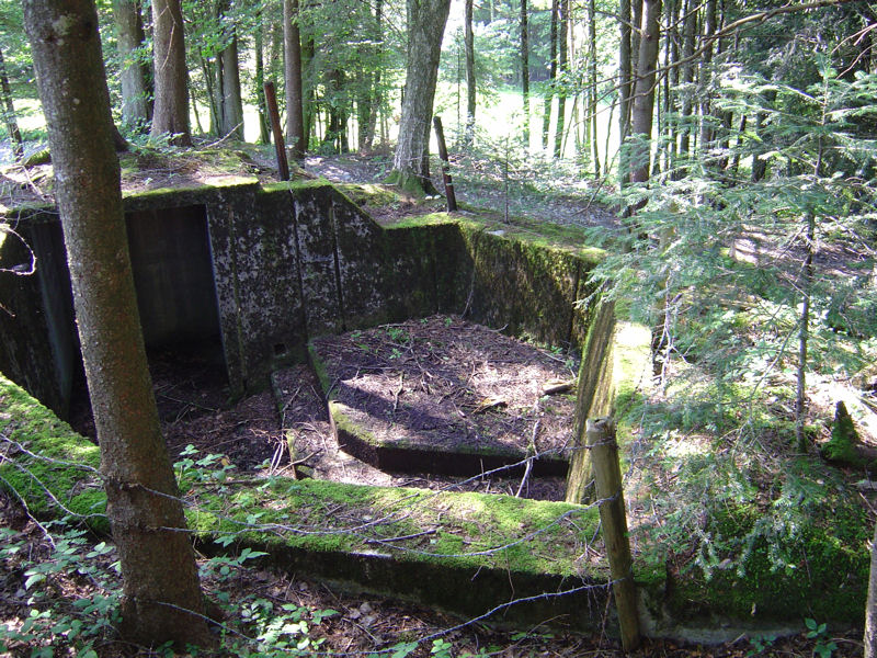 Geschützbettung Bucklen, Kt. Zug: Artilleriestellung Illenberg Ost A 7267???, Artilleriestellung offen für 7,5cm Feldkanone, Unterägeri